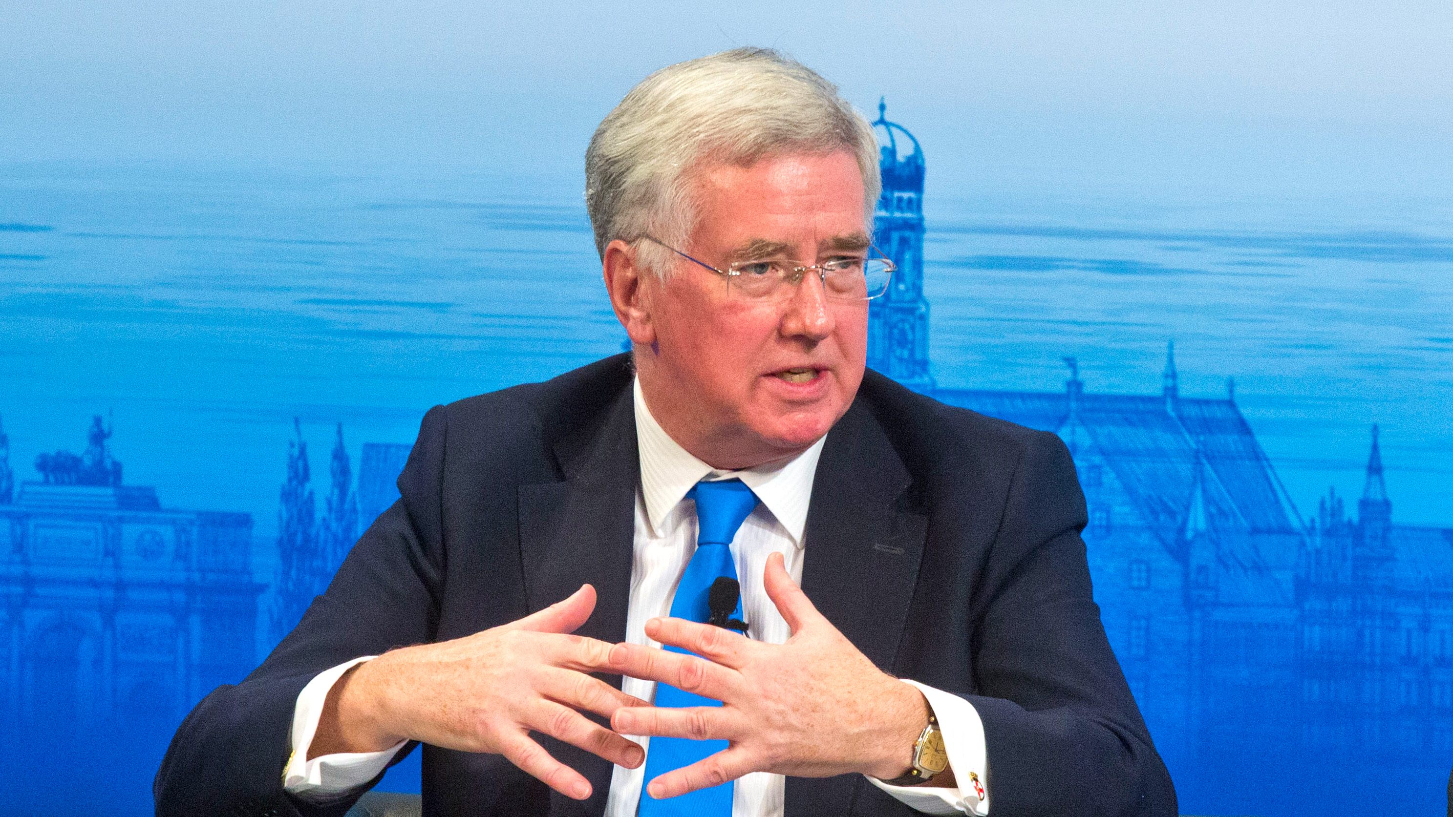 Michael Fallon während der Münchner Sicherheitskonferenz 2016